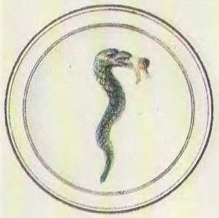 Беларуская (тарашкевіца): Пружаны (Pružany). Герб